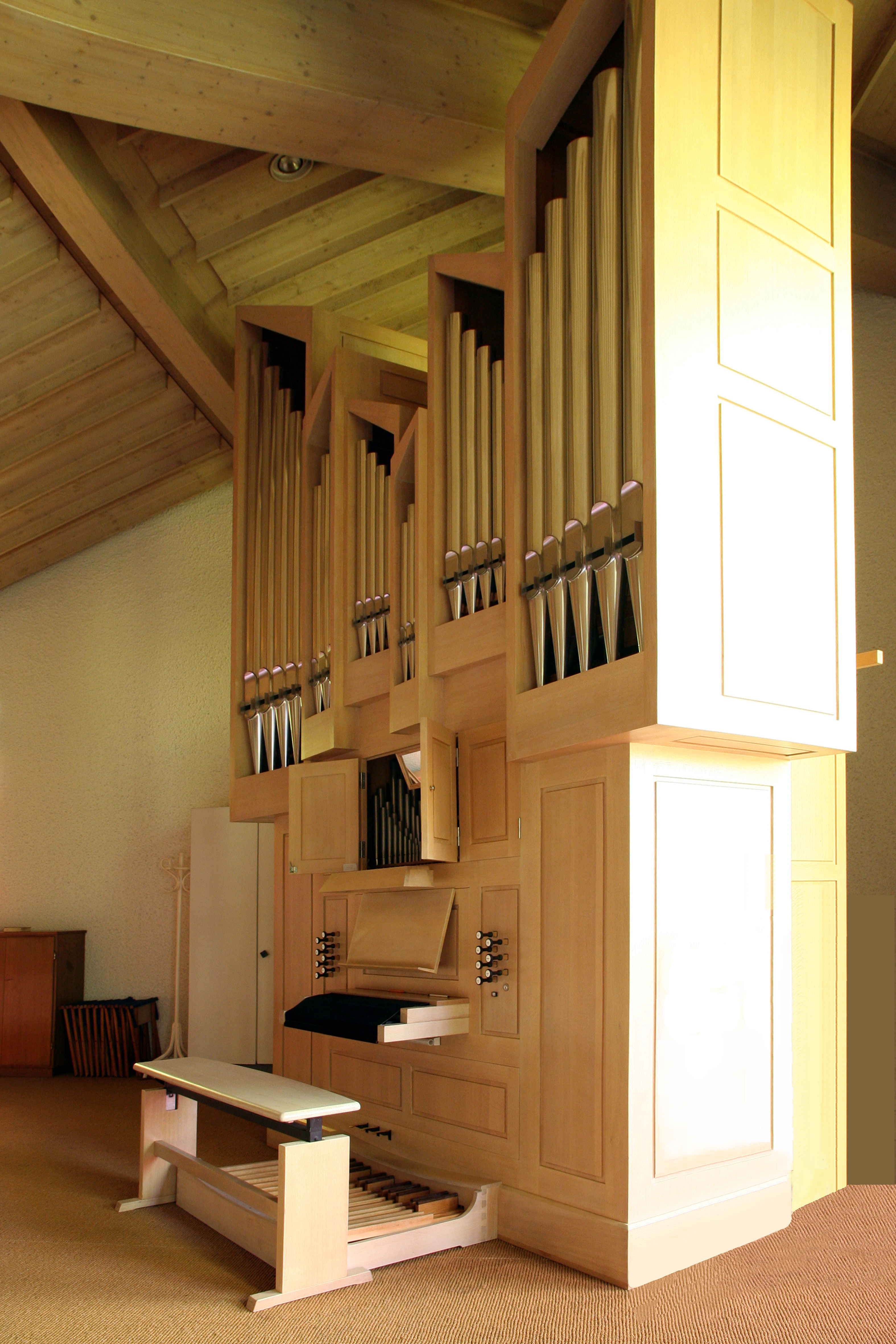 Römisch-katholische Kirche St. Plazidus und Sigisbert Kleinandelfingen, Orgel von de Gier (Uhwiesen), 1989/1990)